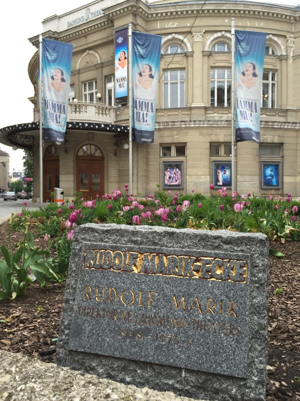 Gedenkstein für Rudolf Marik-Ecke